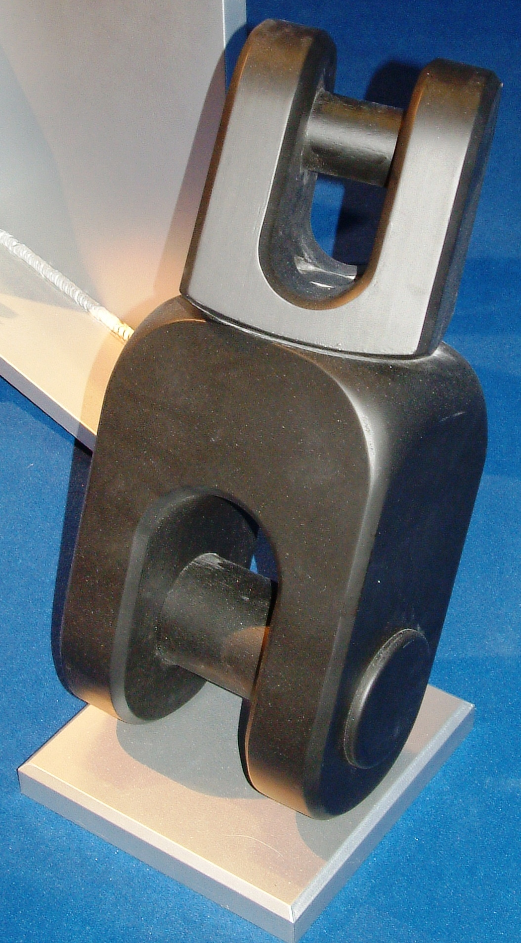 Europort 2009